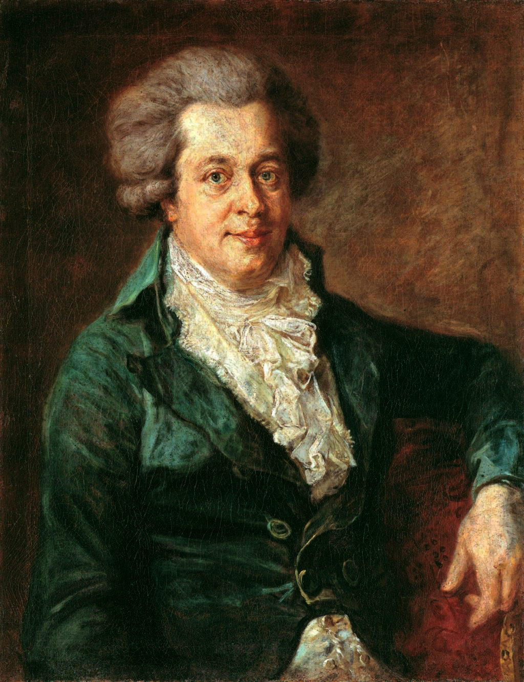 Porträt von Wolfgang Amadeus Mozart (1756-1791); Johann Georg Edlinger hat das letzte Porträt des berühmten Komponisten gemalt. 1756 wurde Mozart in Salzburg geboren und starb mit 34 Jahren in Wien. Zu seinem 249. Geburtstag wurde das Bild 2005 der ganzen Welt als Mozart-Porträt vorgestellt; es war schon 70 Jahre im Besitz der Gemäldegalerie der Staatlichen Museen Berlin, ehe man feststellte, dass es Mozart darstellt. Für eine Diskussion der Authentizität, siehe File:Edliner Mozart.jpg (auf english) und Johann Georg Edlinger#Der „Edlinger-Mozart“